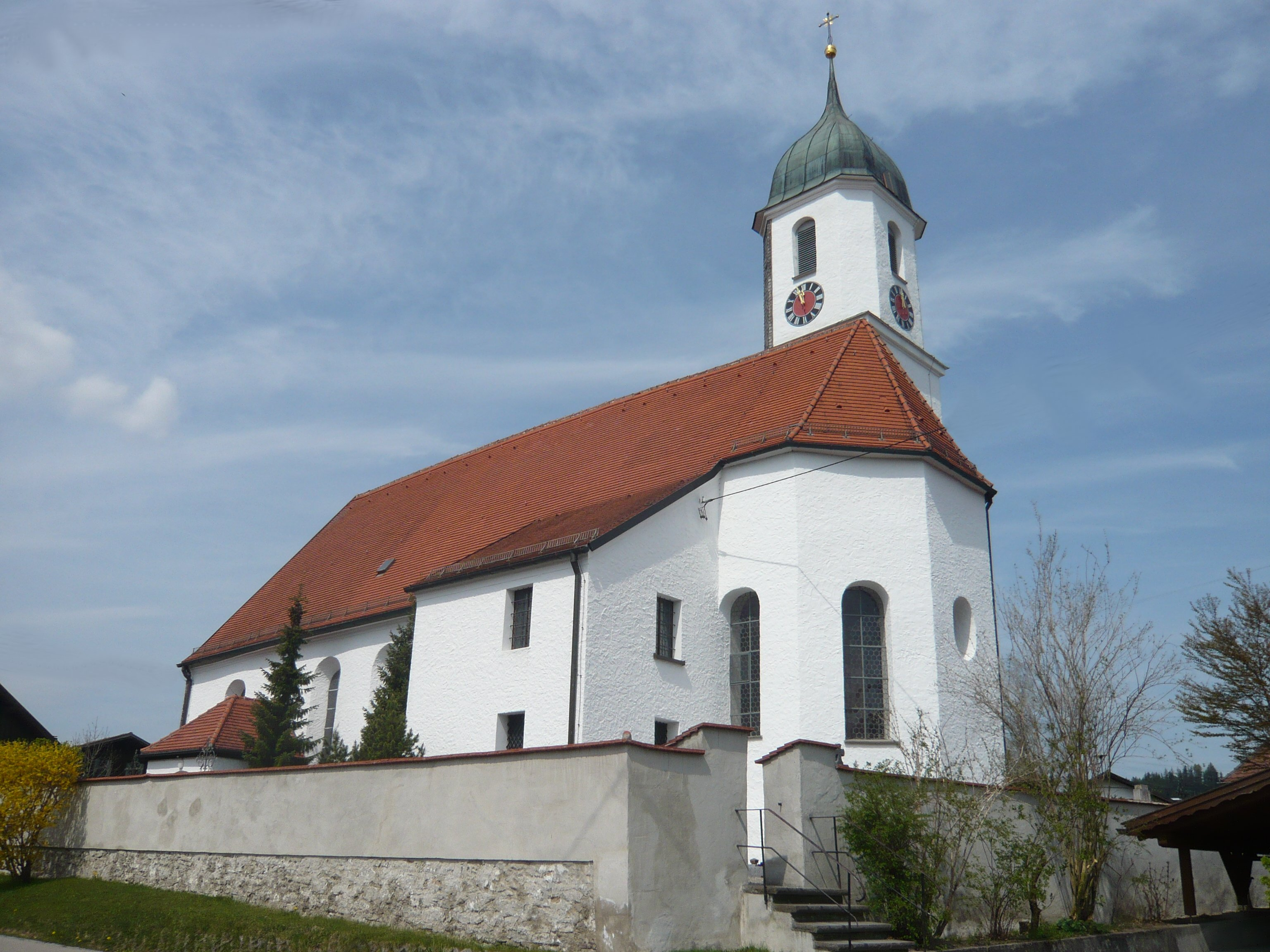 Pfarrkirche St. Moritz in Zell, Gde. Eisenberg (Ostallgäu)